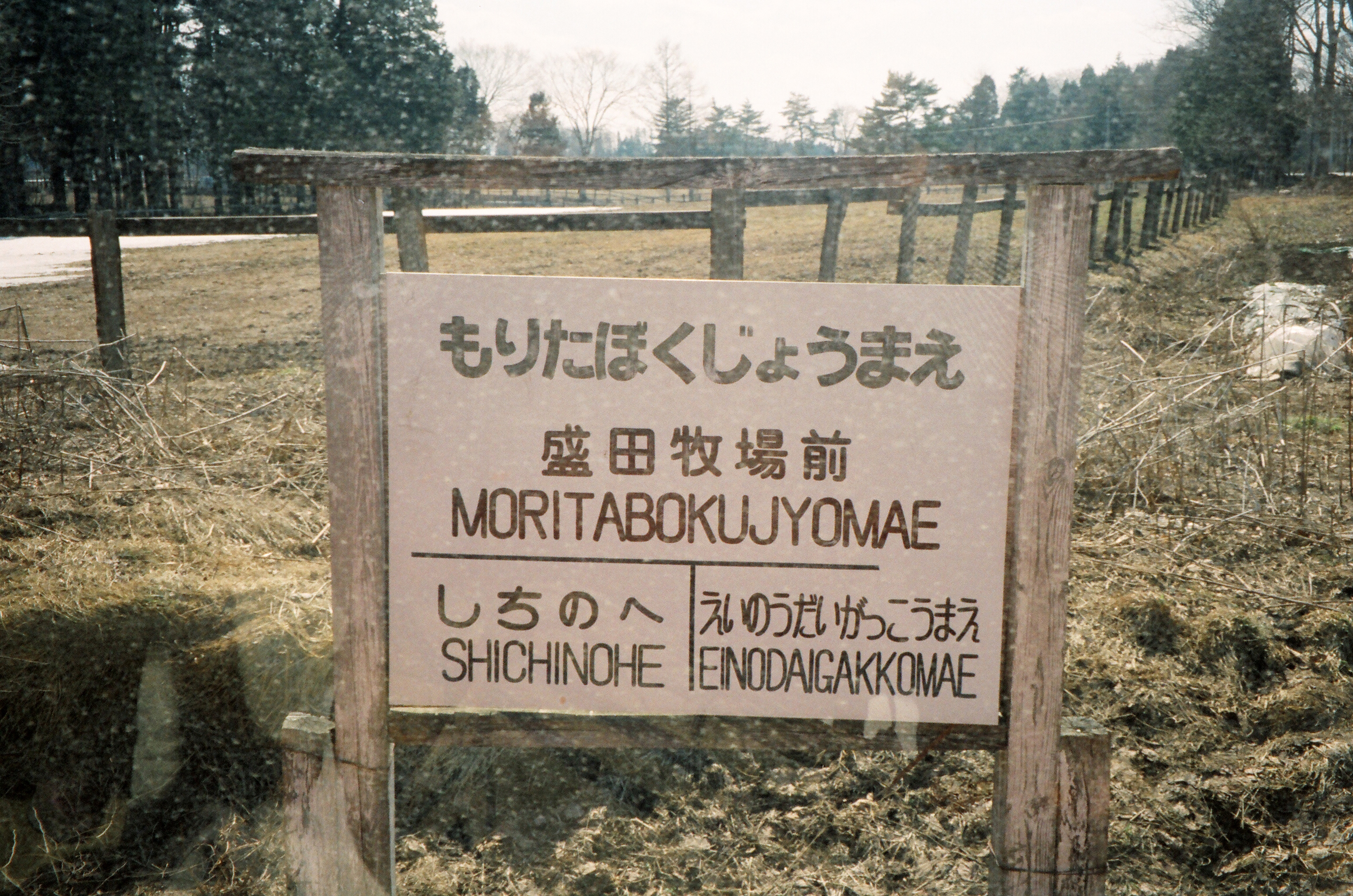 南部縦貫鉄道線 盛田牧場前駅（1997年3月26日撮影）